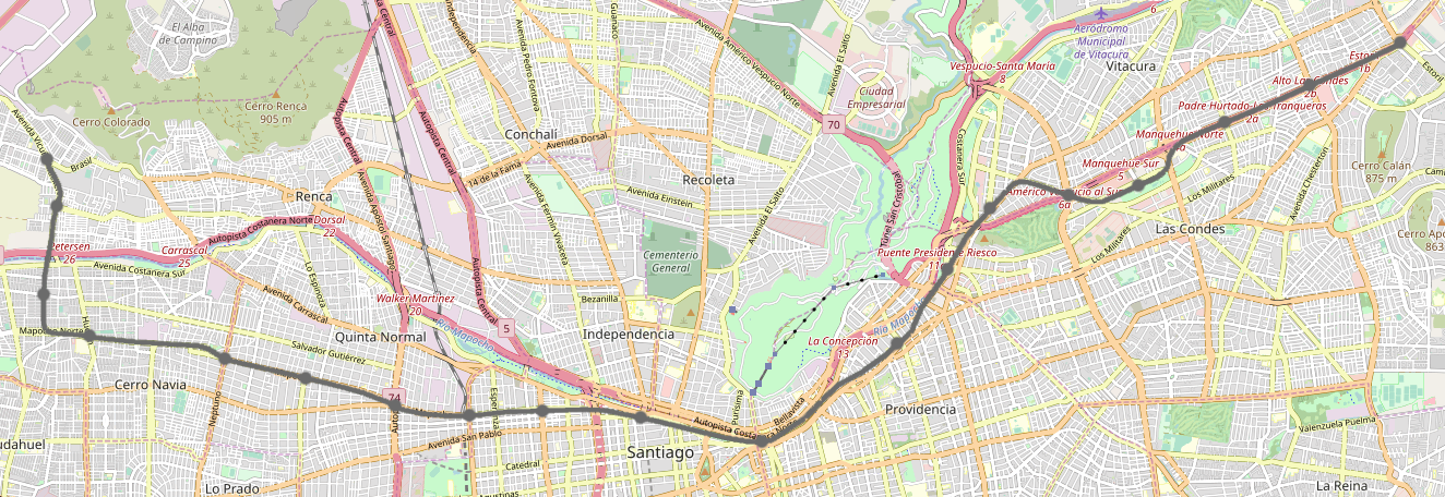 Mapa con el recorrido de la Línea 7 del Metro de Santiago